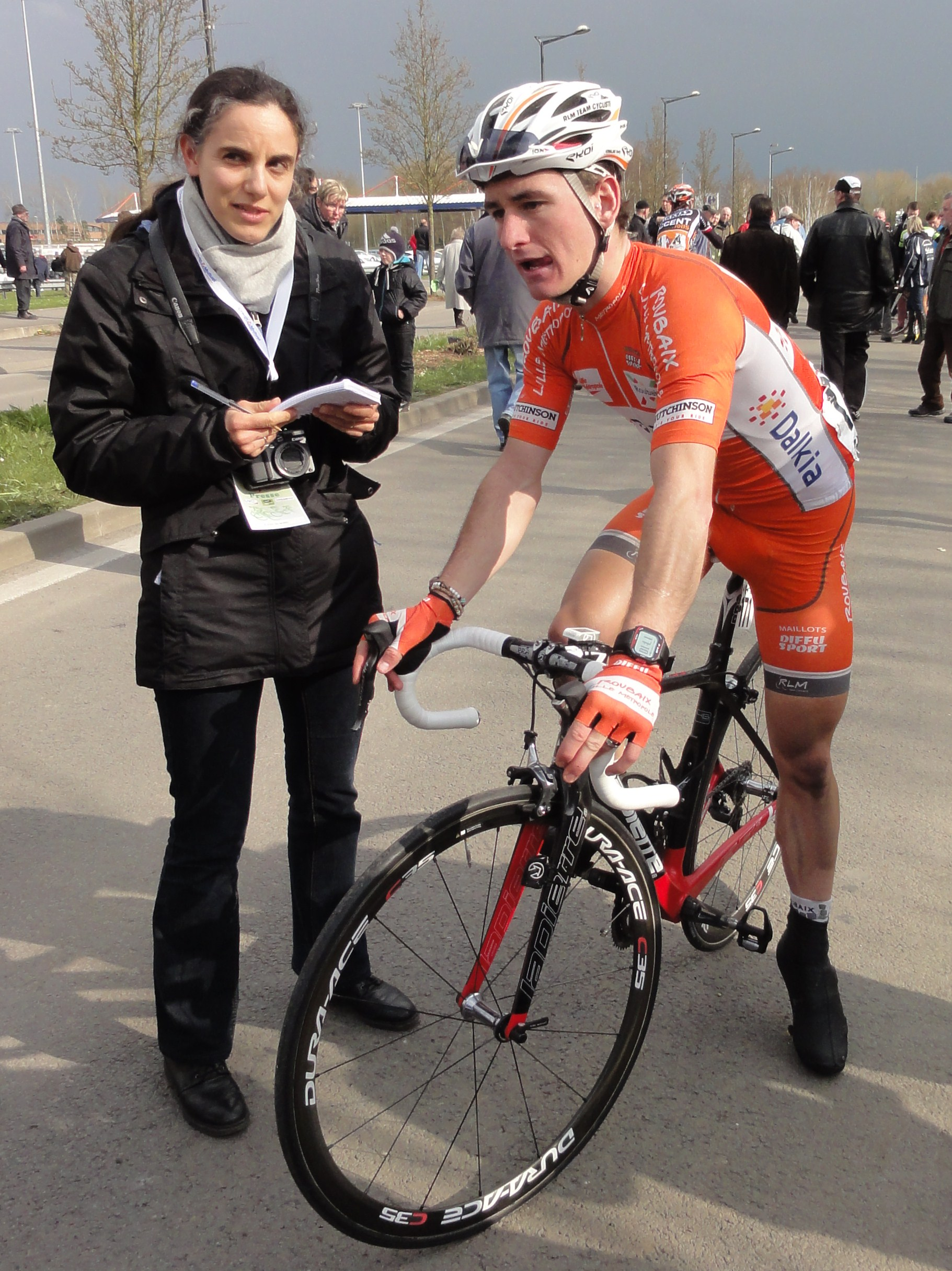 Reportage photographique réalisé le mardi 11 avril 2013 durant l'édition 2013 du Grand Prix de Denain à Denain, Nord, Nord-Pas-de-Calais, France. Depicted person: Rudy Kowalski